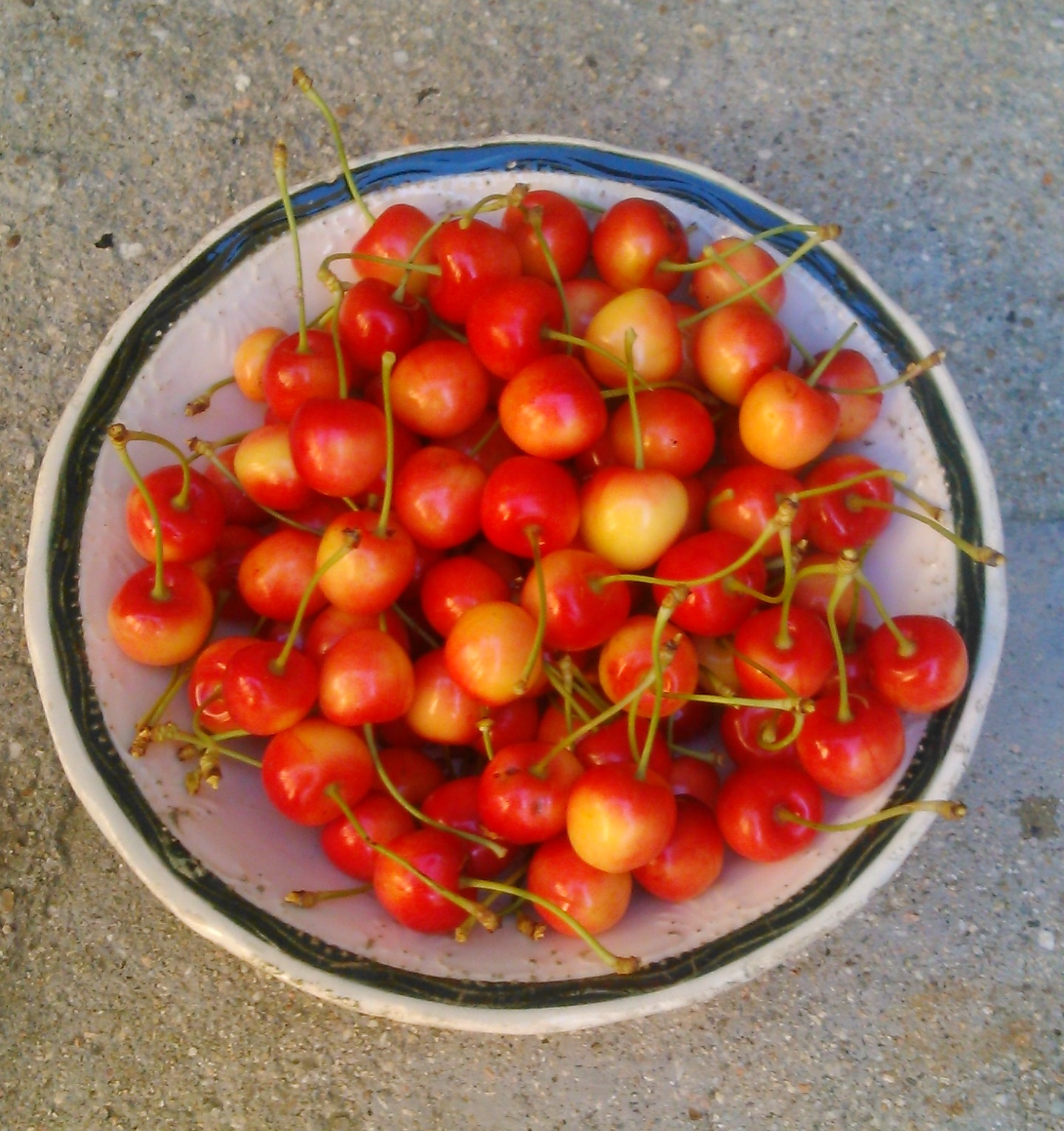 Plato de cerezas obtenido de un árbol de Villafranca de la Sierra (ÁVILA)